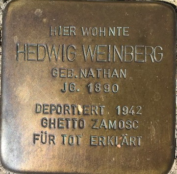 Stolperstein von Hedwig Weinberg in Bad Sassendorf Kaiserstrasse